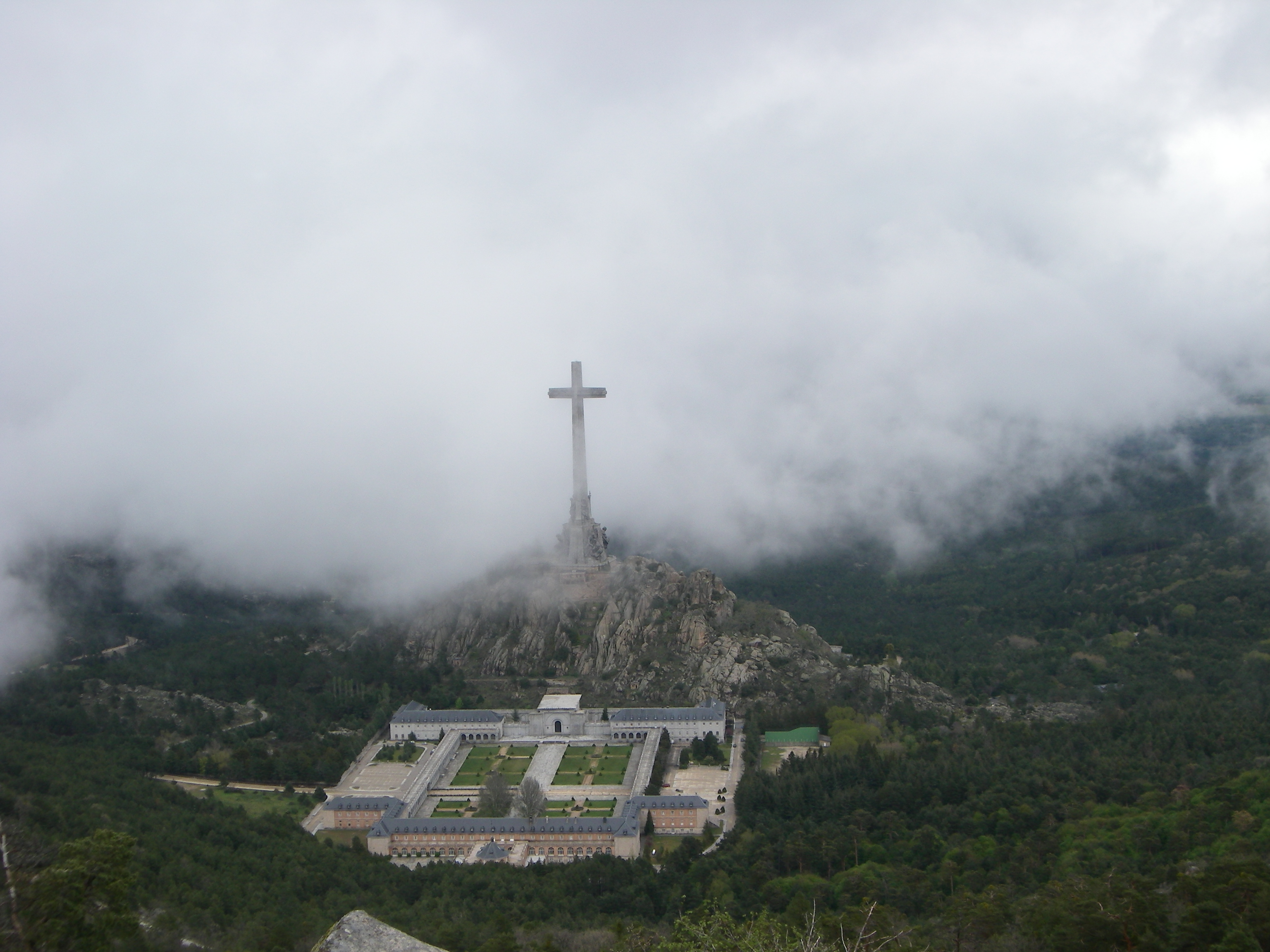 O cu da vergonza